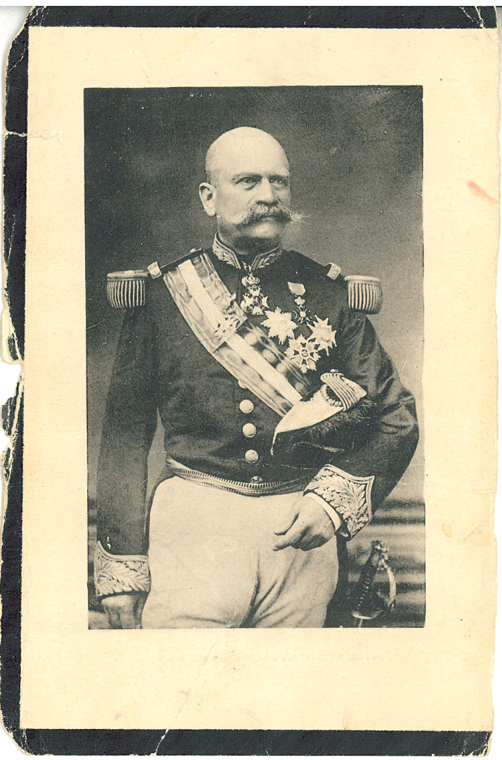 Scan de l'image pieuse du décès de Charles Pontus